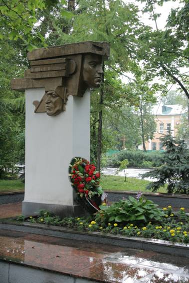 Липецк, сомневаюсь, что Ленинский сквер. Старожилы знают, что в нем стояла статуя Сталина - потом, конечно сменили. Помню Ленина, но с названием большие сомнения